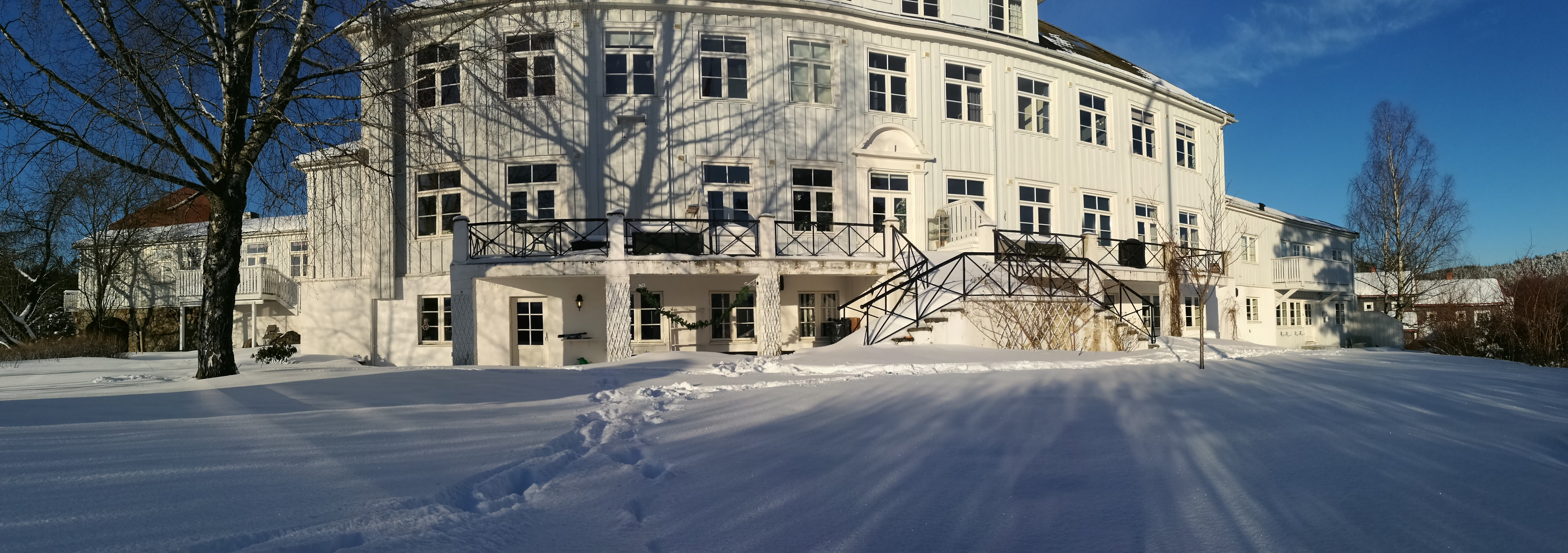 Skullerudbakken 12 Oslo, vinteren 2018